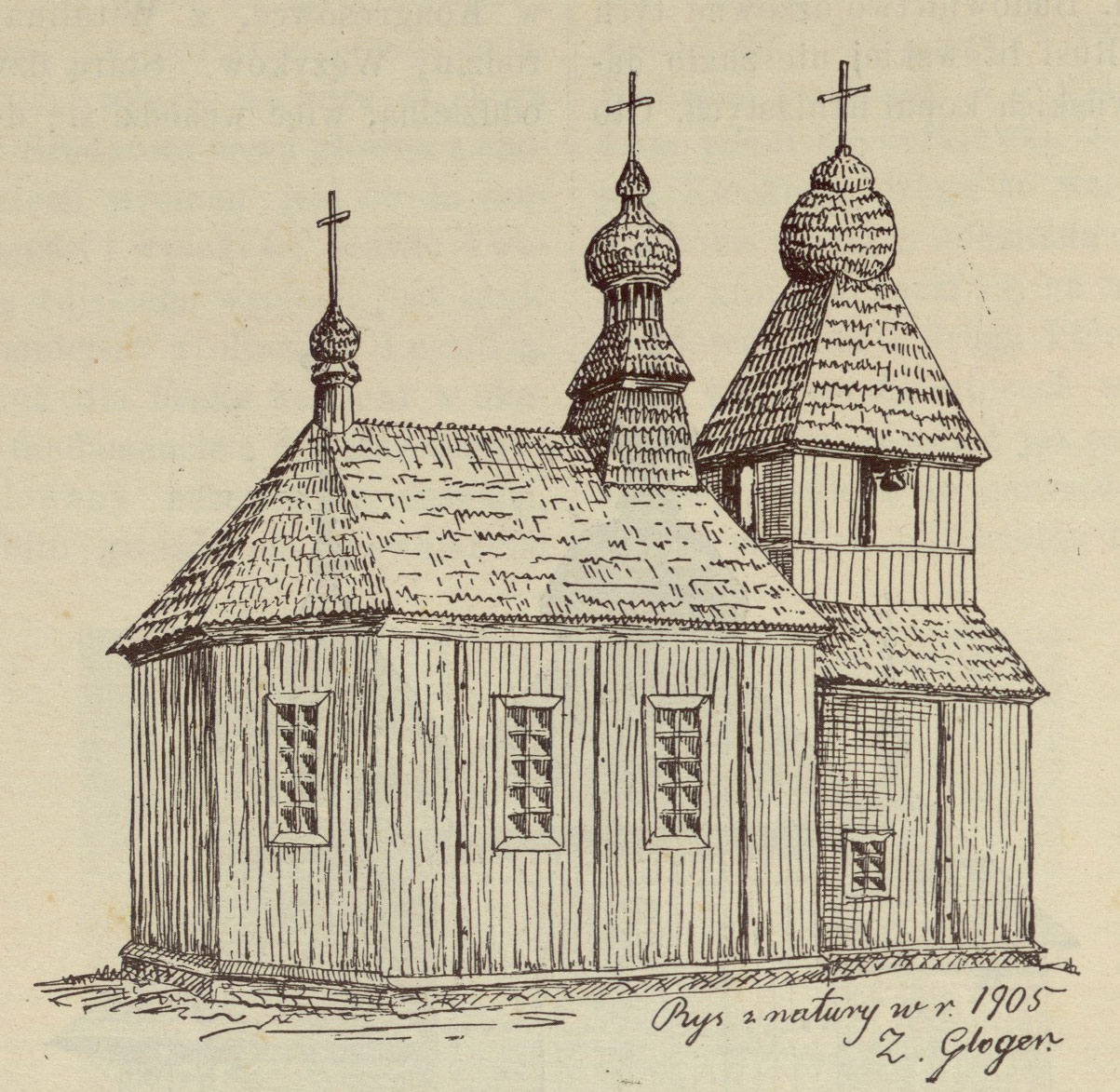 Беларуская (тарашкевіца): Дастоева (Dastojeva). Царква Сьвятога Ільлі Прарока